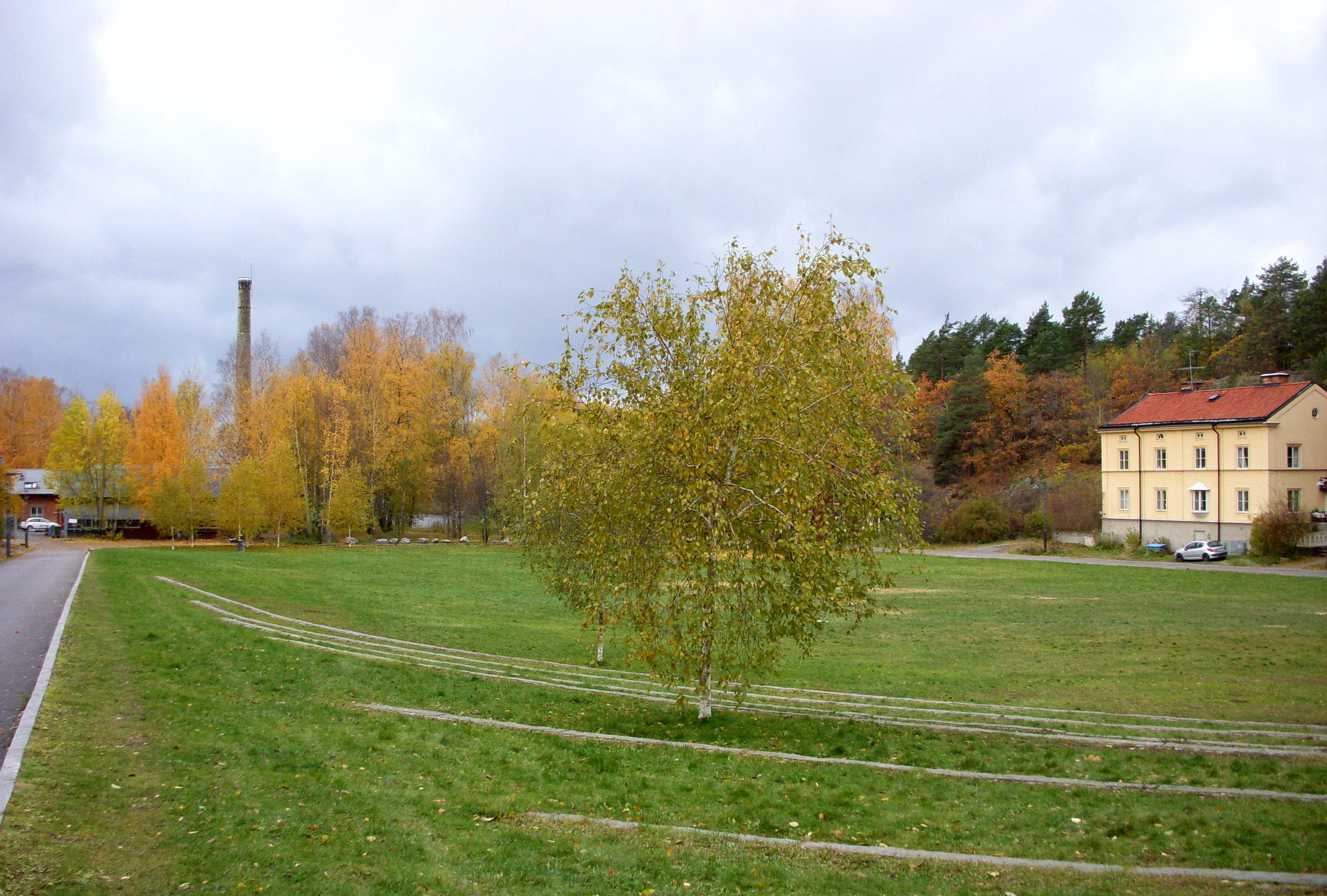 Vinterviken, Alfred Nobels tidigare fabriksområde